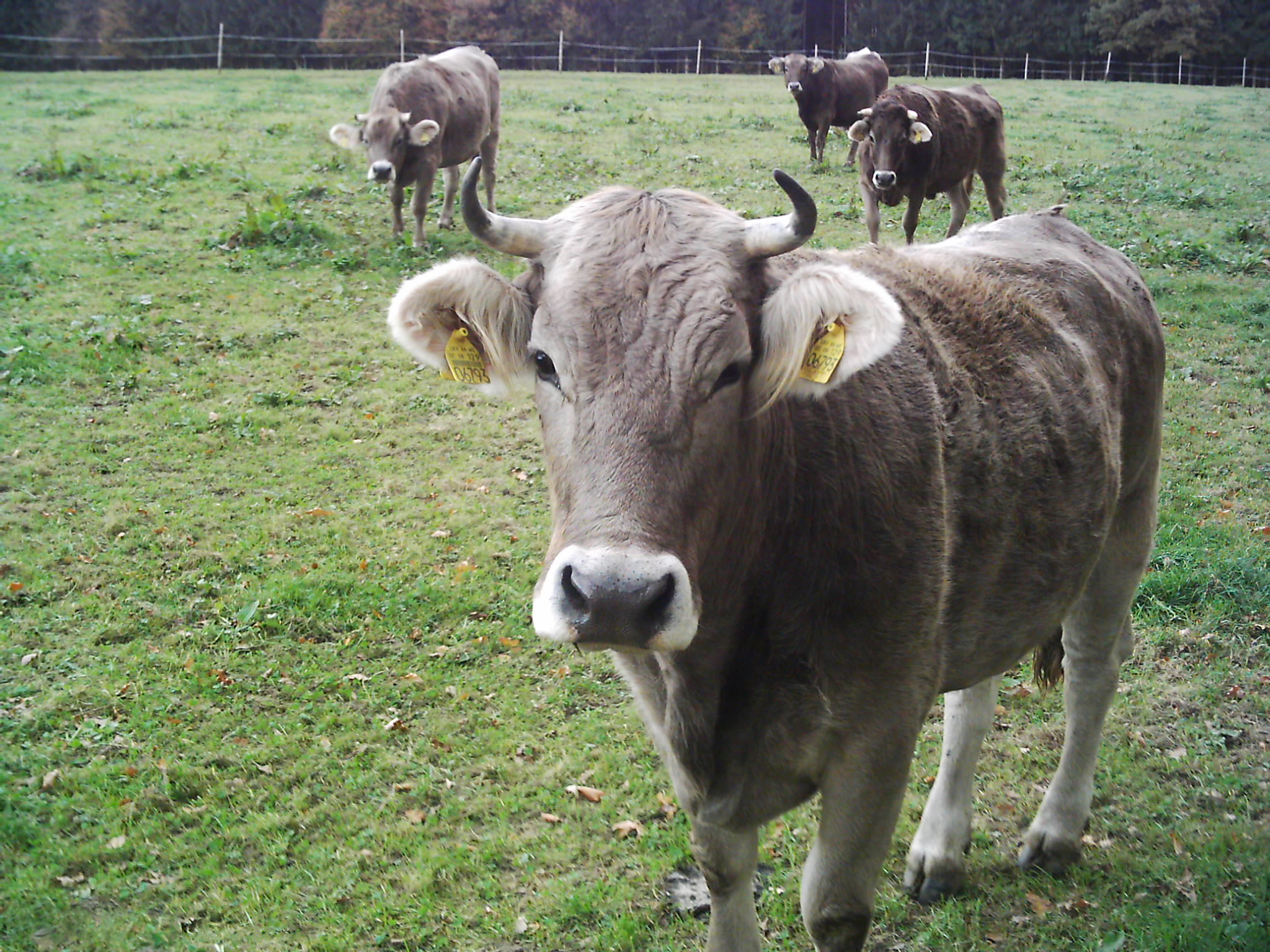 Allgäuer Braunvieh mit Ohrmarke, Deutschland